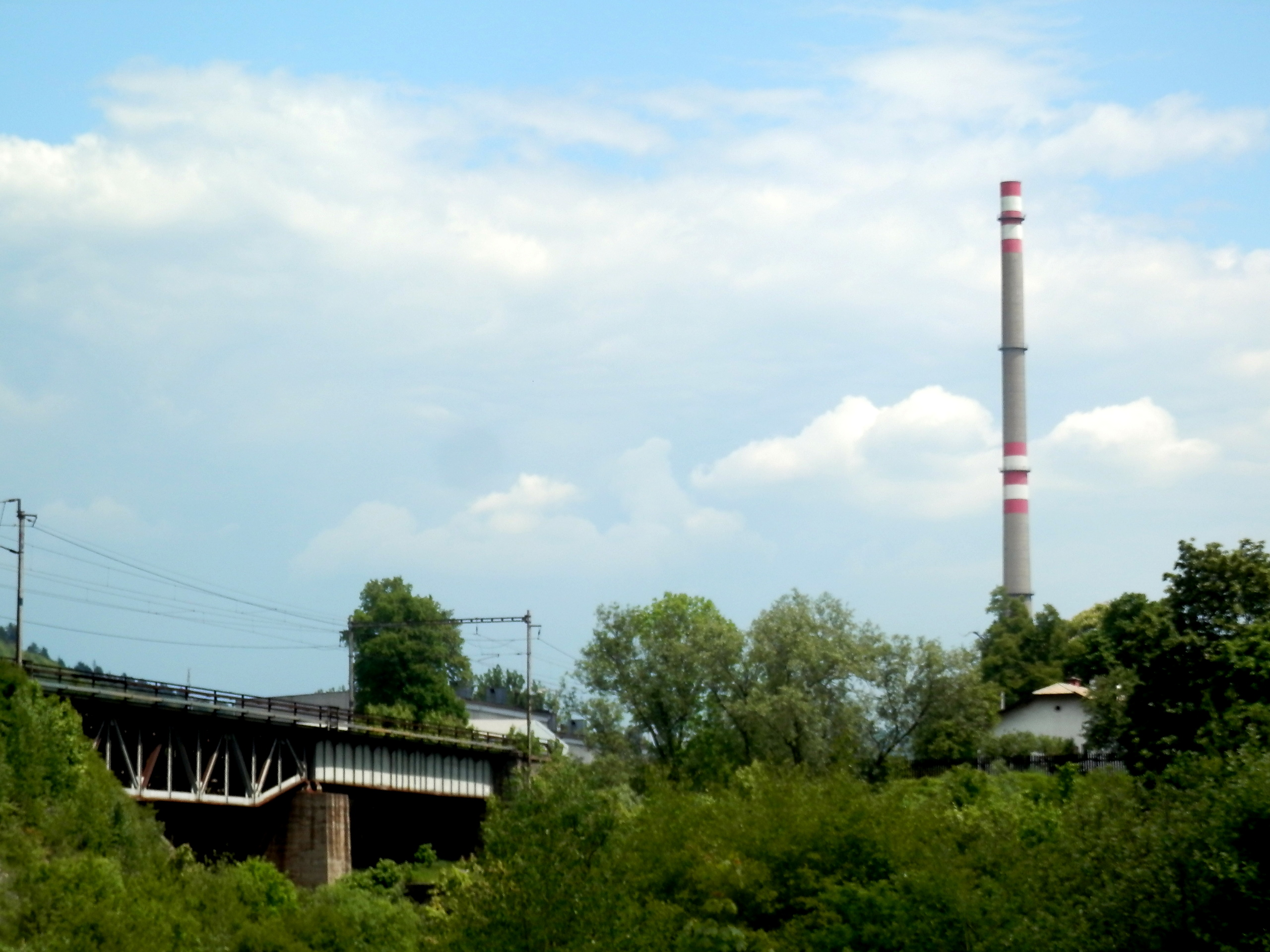 Továrenský komín. Mesto Krompachy.